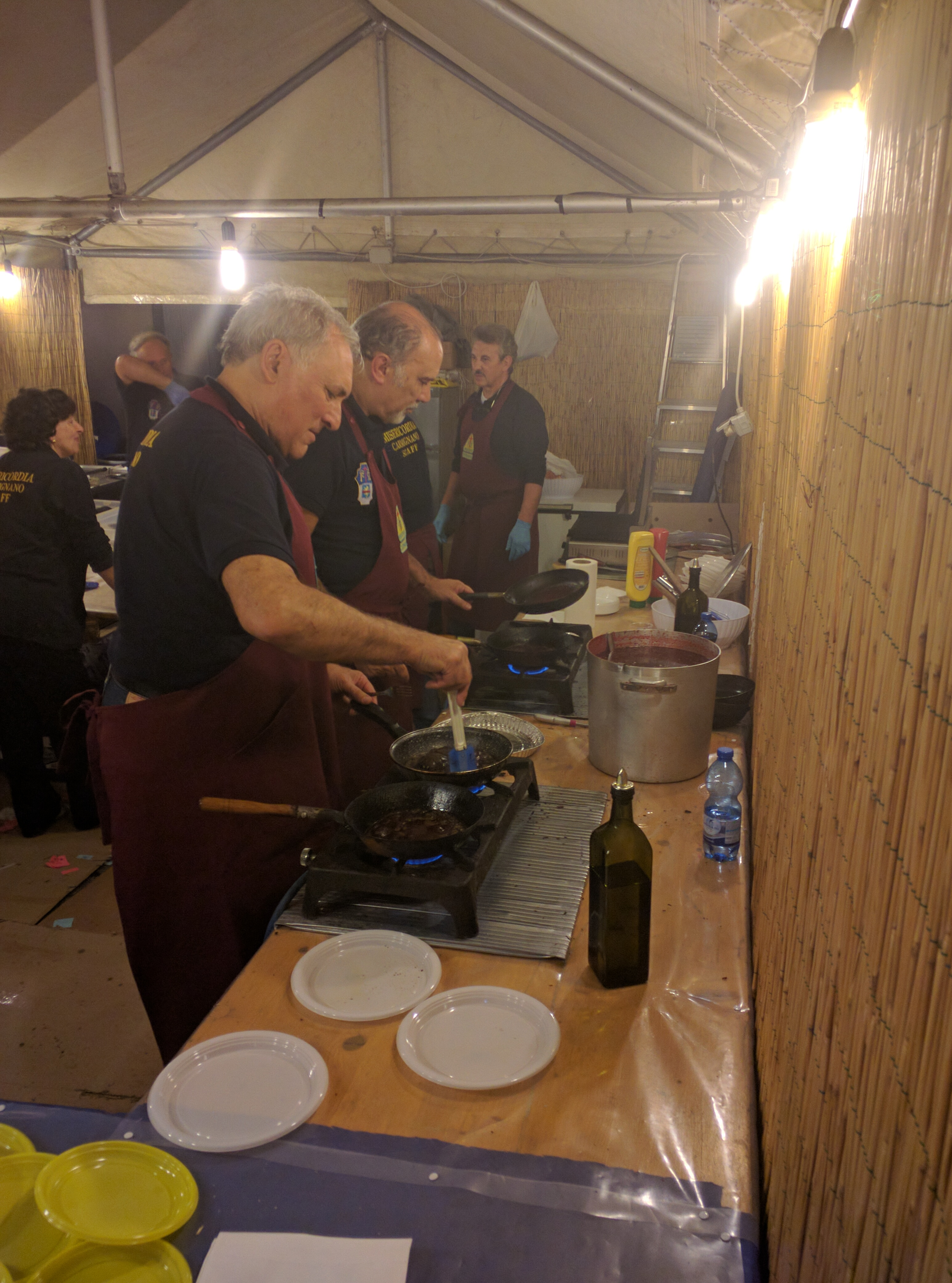 cooking pig blood